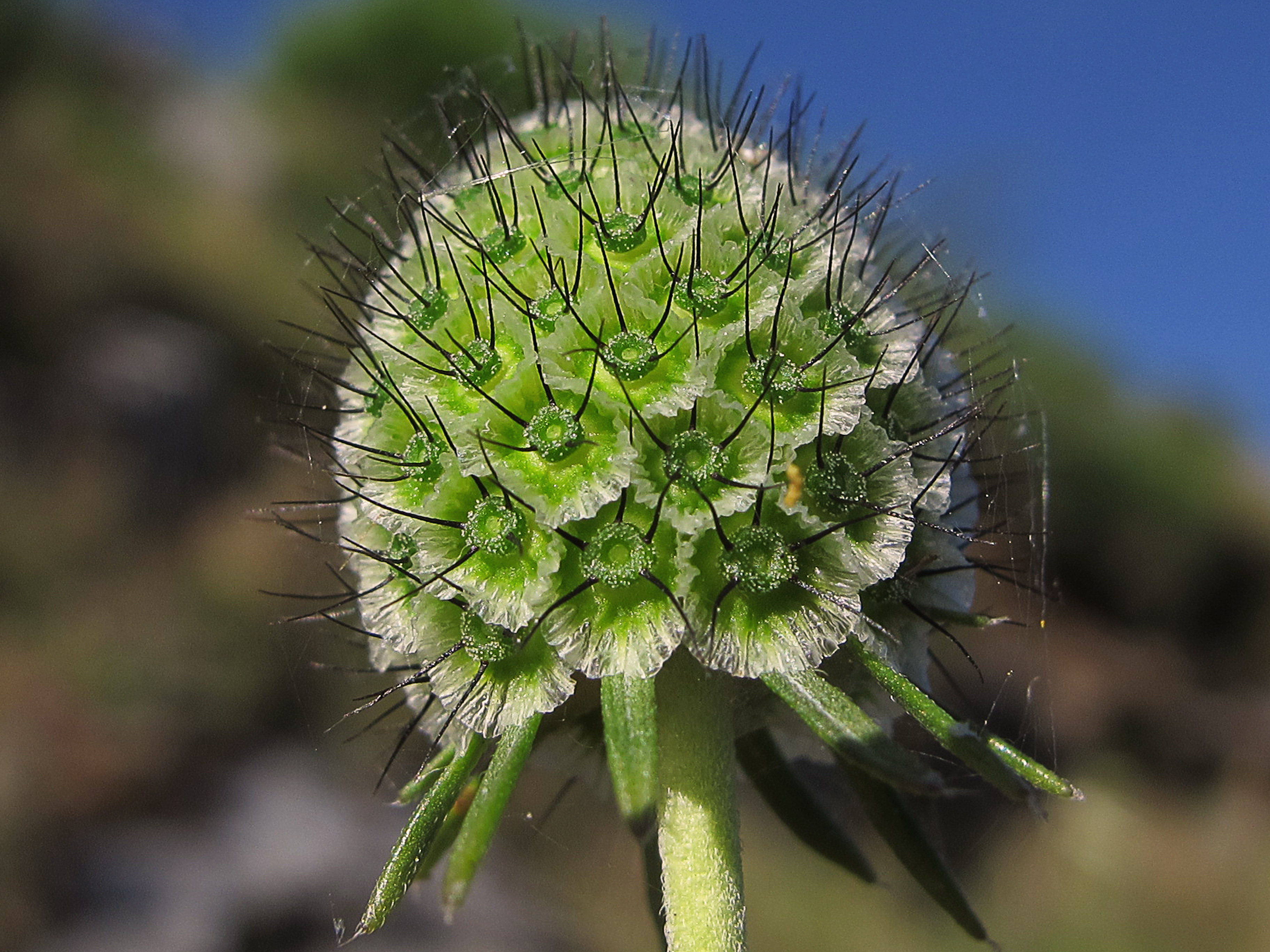 Semillas-Frutos